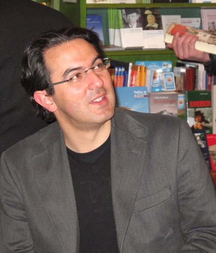 Lesung am 14.04.2011 in München, Buchhandlung Lehmkuhl